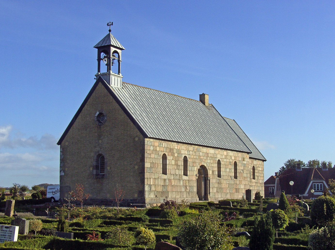 fra sydvest